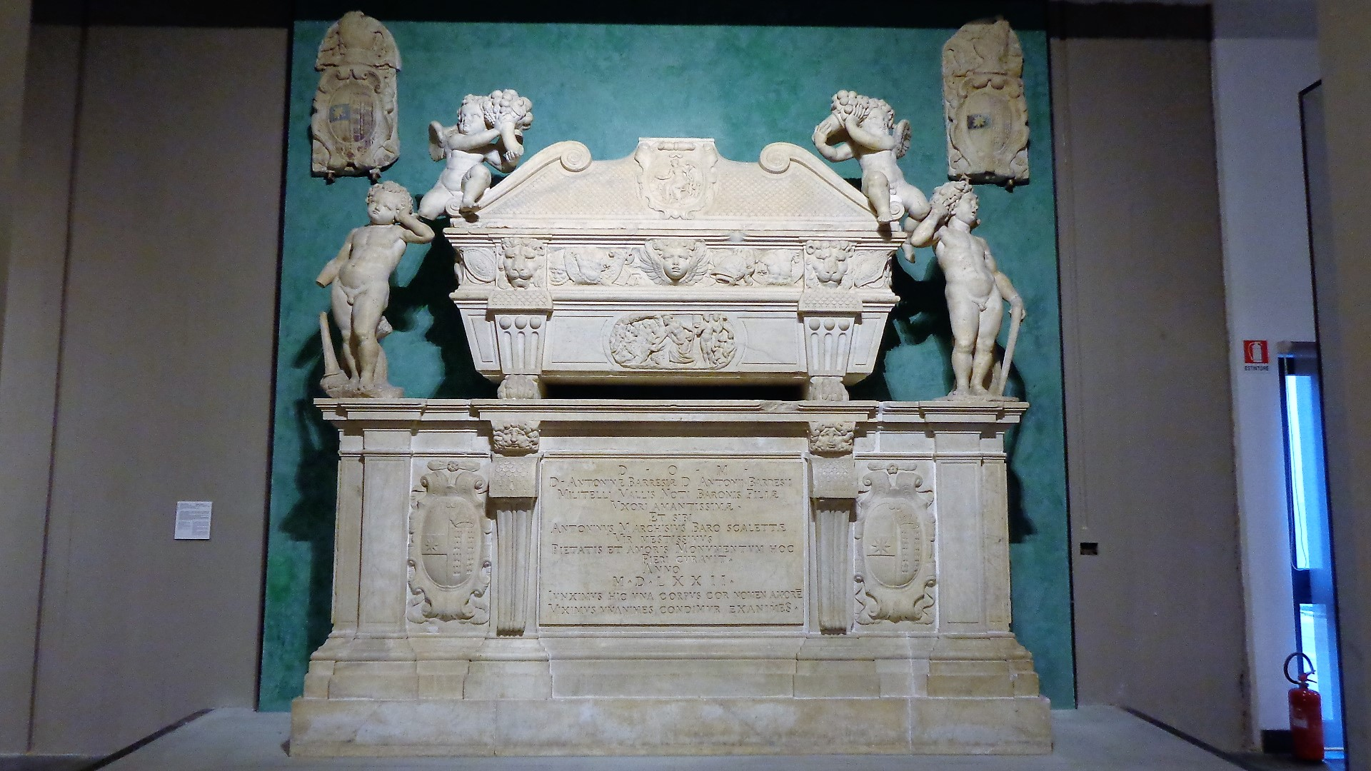 Sarcofago